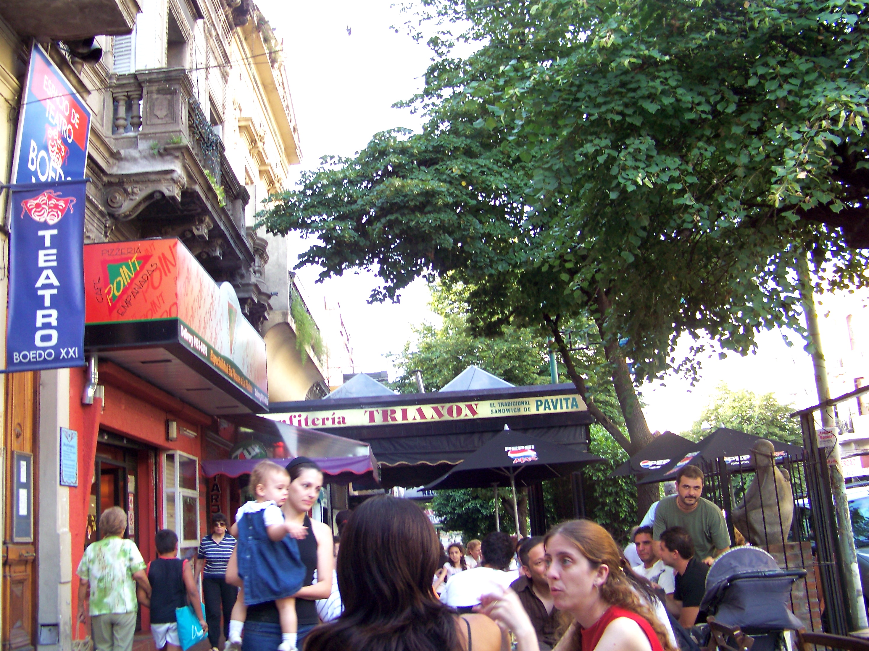 Cafes along Boedo Avenue, Buenos Aires.